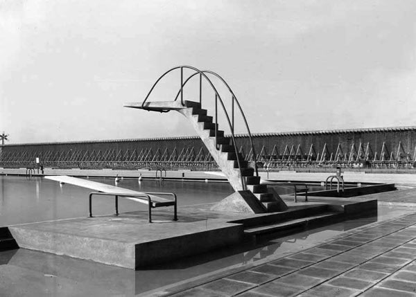 Басейн у Цехоцінку. Архітектор Ромуальд Гутт (1888—1974), інженер Александер Шньоліс.